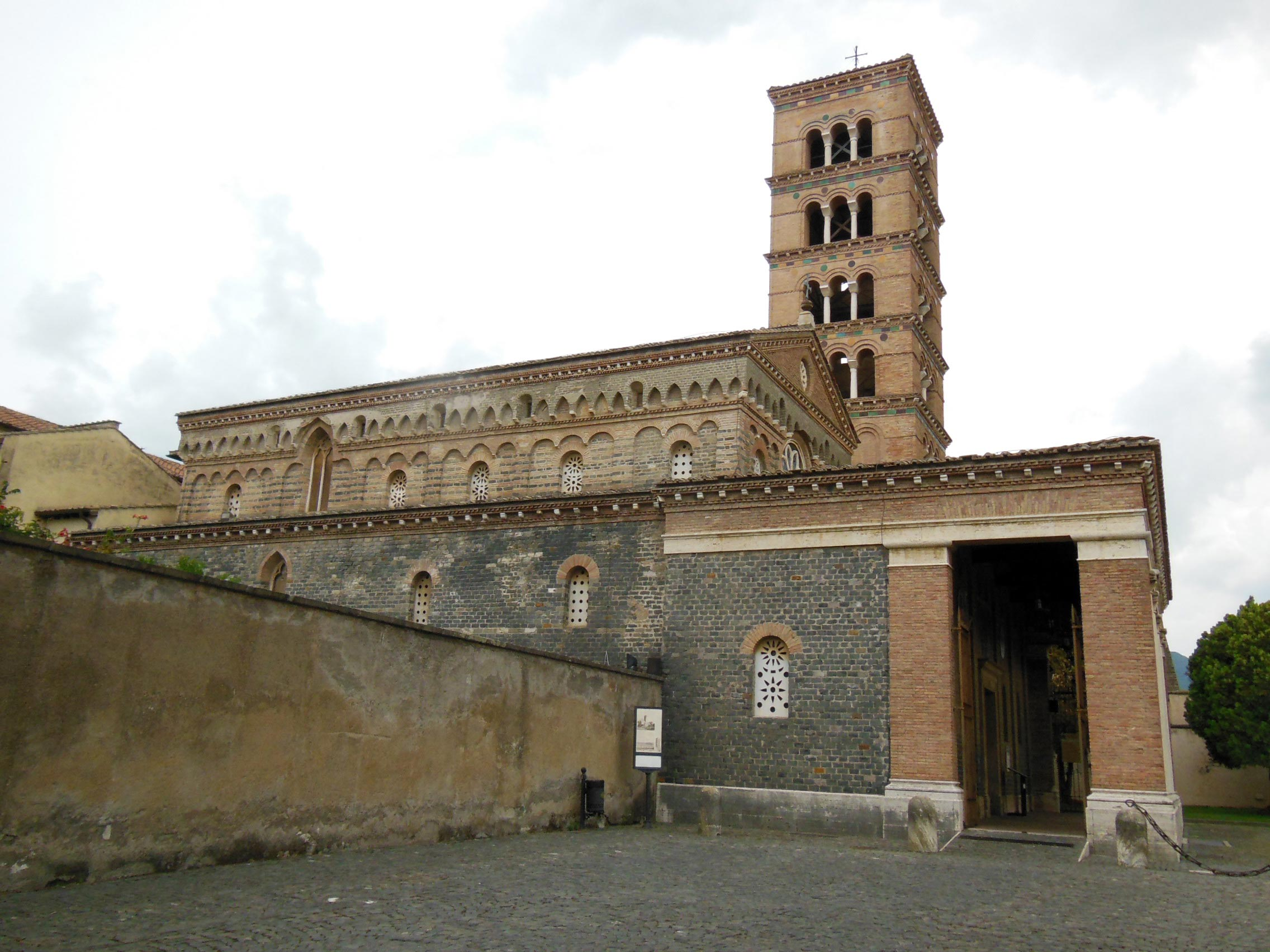 Italia, Lazio, provincia di Roma, Grottaferrata, abbazia territoriale di Santa Maria (abbazia di San Nilo), chiesa abbaziale, fianco sinistro